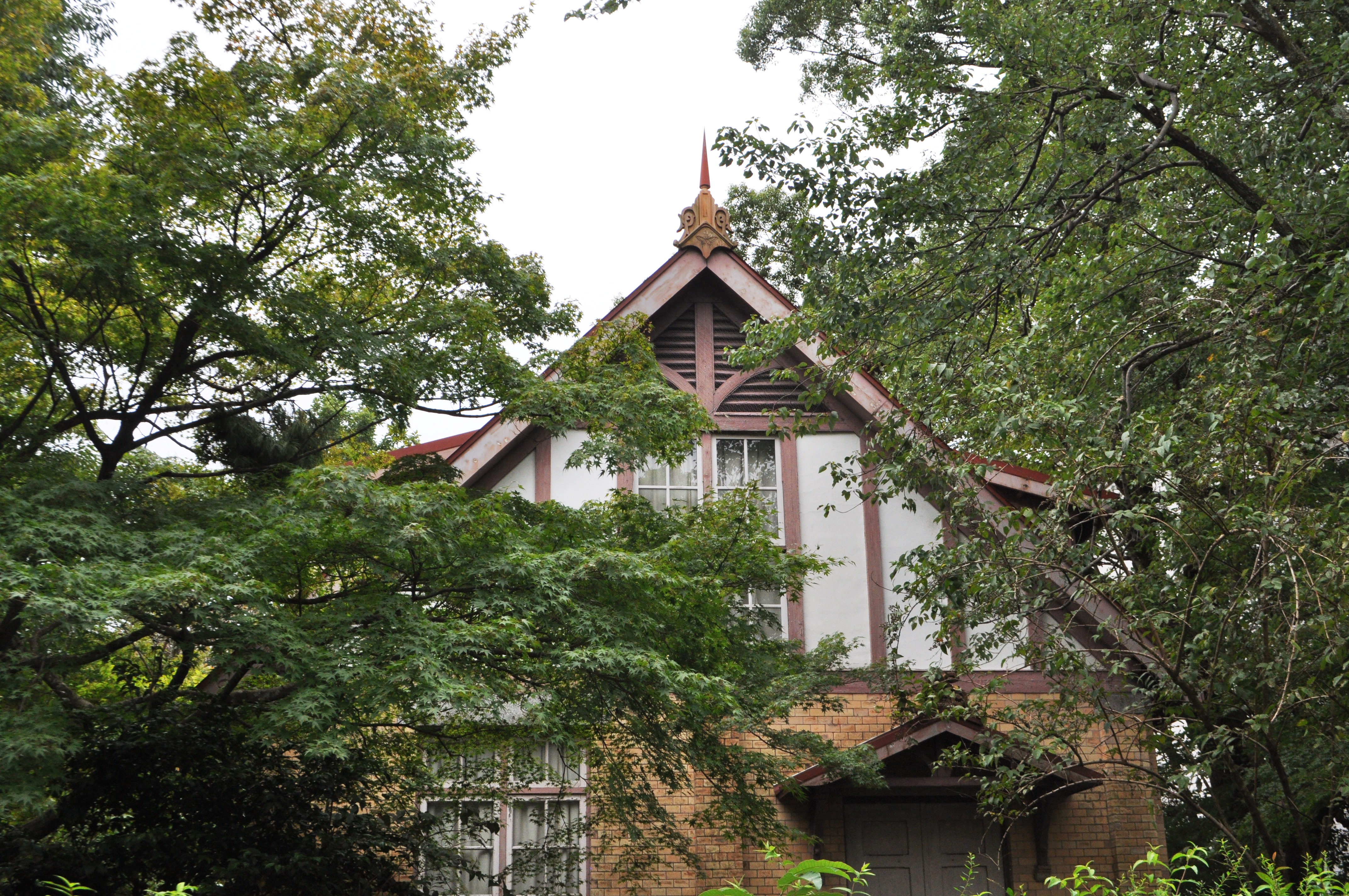 武田五一設計。屋根の鬼瓦の部分に、創立者・名和靖が発見したアゲハチョウが彫刻されている。（現在屋根に取り付けられているのはレプリカで、オリジナルは館内に保存されている）。Luehdorfia japonica→Papilio